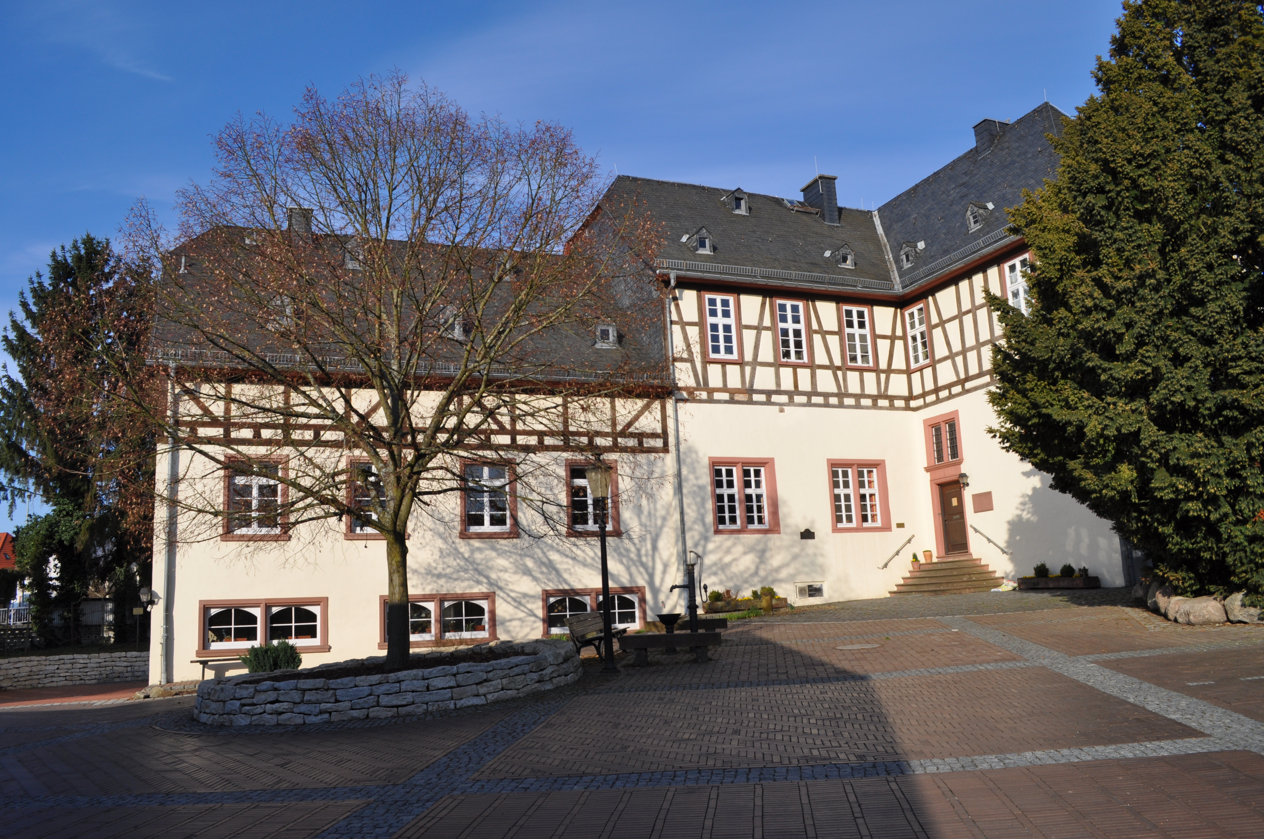 Denkmalgeschützter Amthof später Pfarrhaus, Herrngasse 7 in Neuenhain